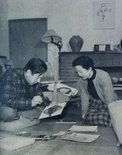 清水将夫・高野由美夫妻